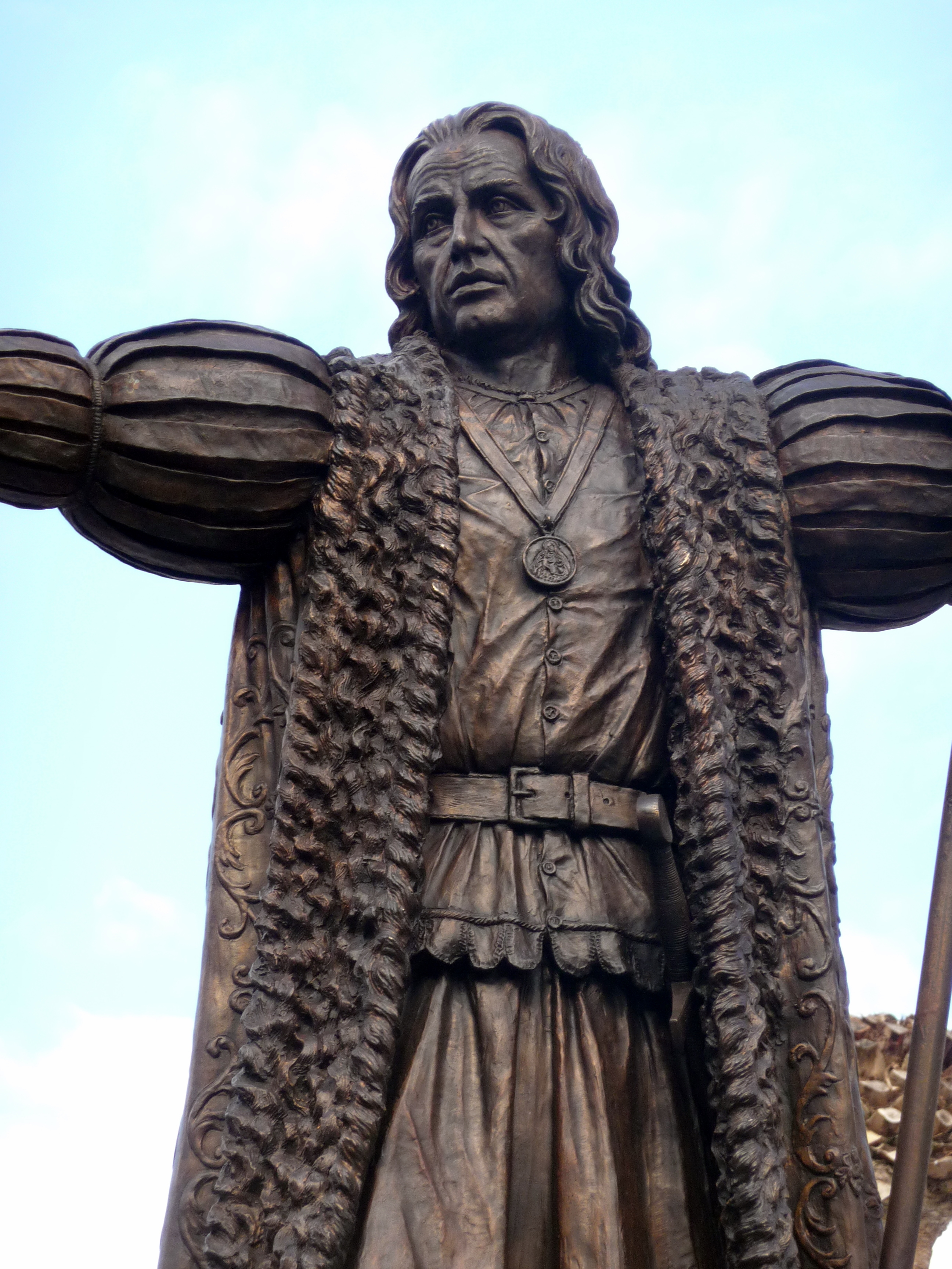 Monumento a Colón (por Elías Picón). Huelva